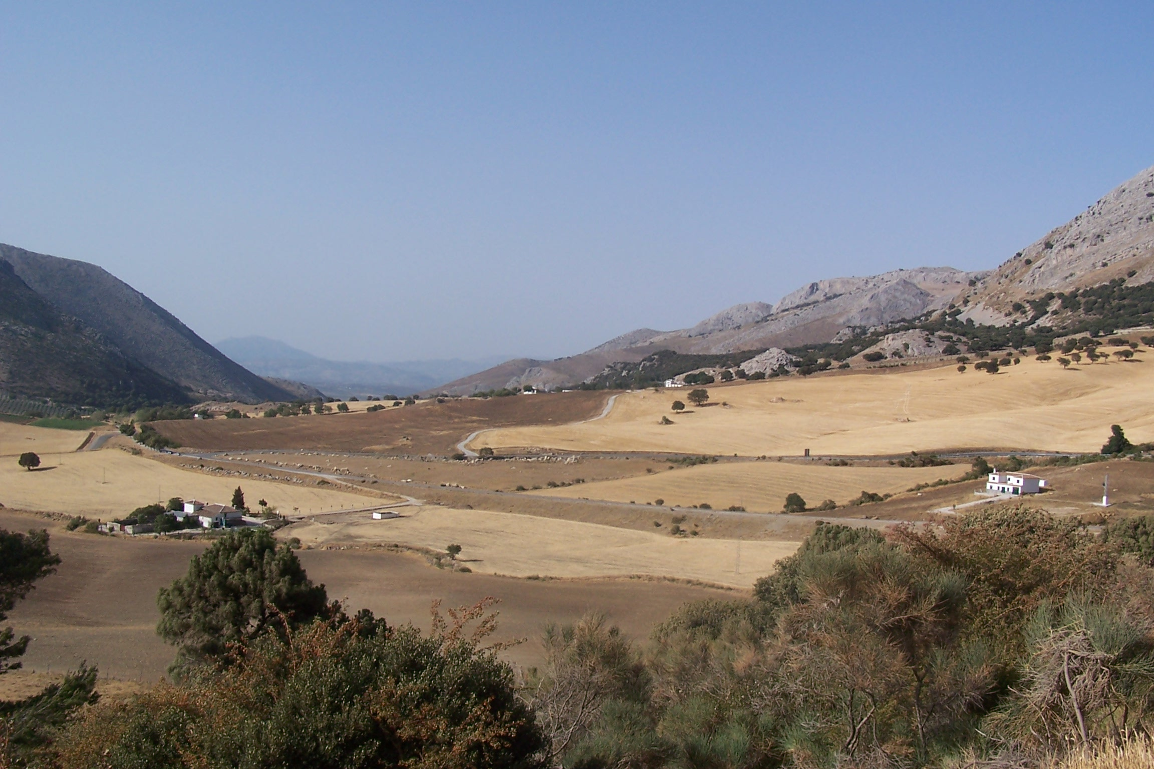 Puerto de los Alazores, nabij provincie Málaga